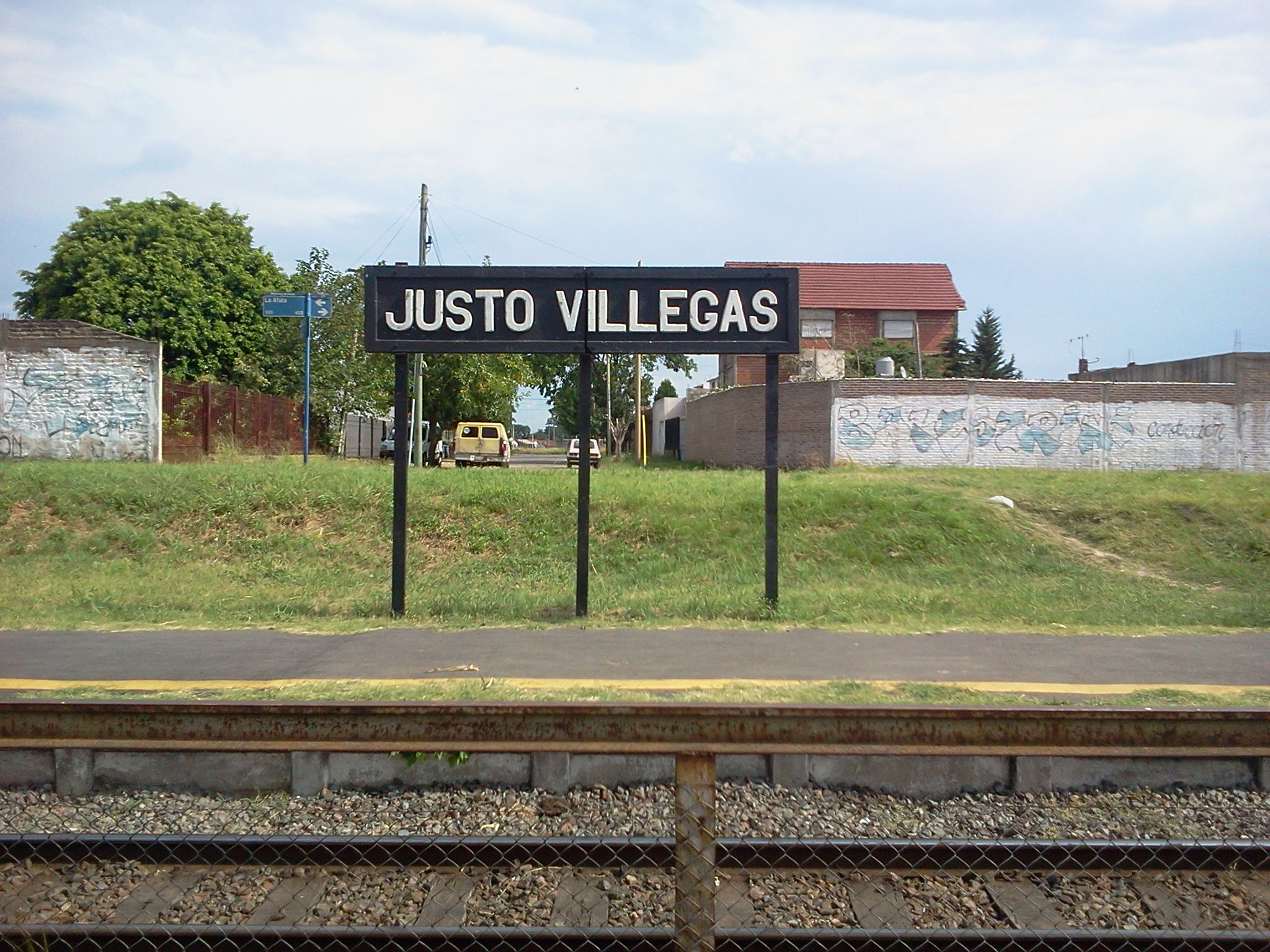 Cartel Nomenclador